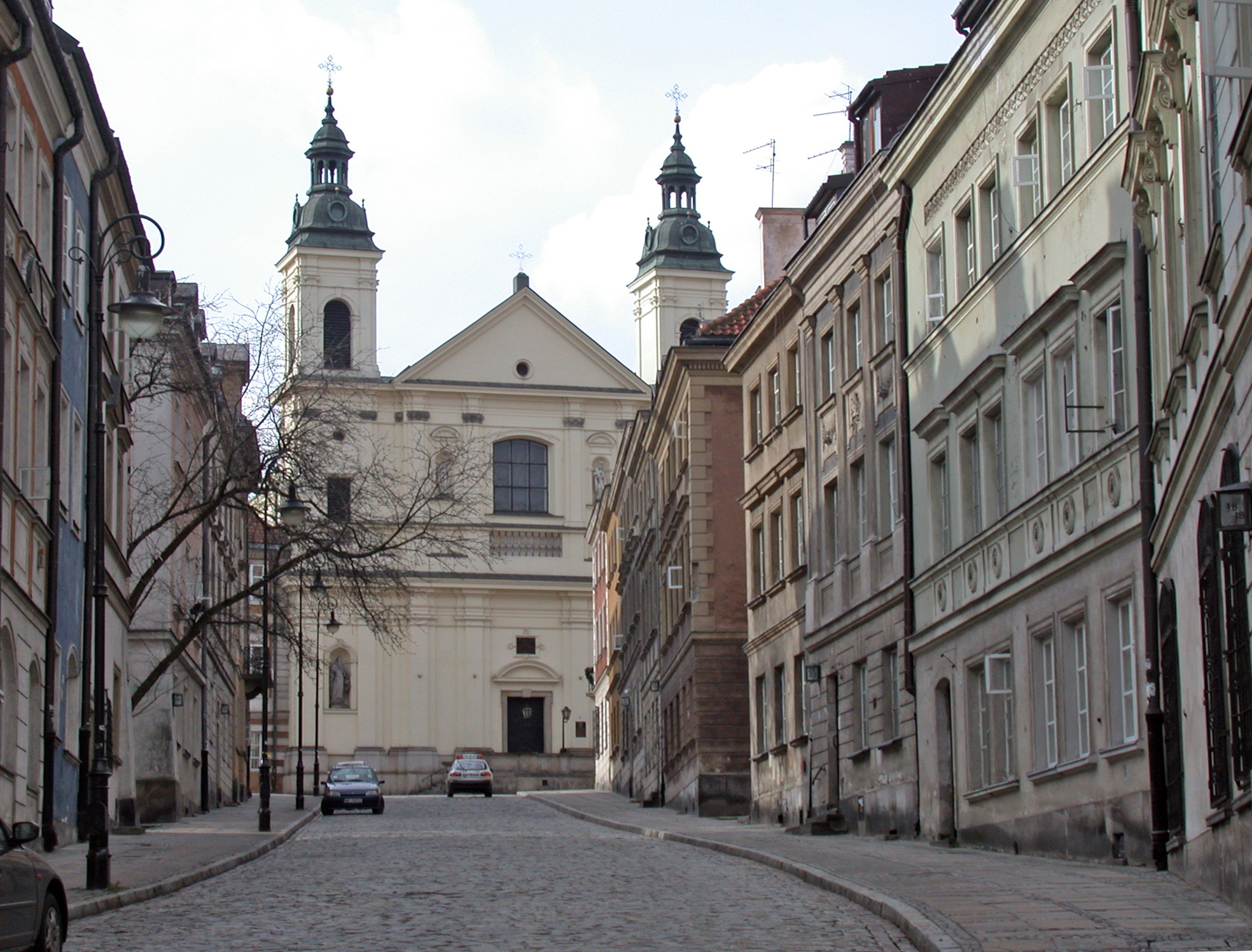 Varsavia, chiesa dello Spirito Santo (kośsciół Św. Ducha, Paulinów), da via Mostowa.